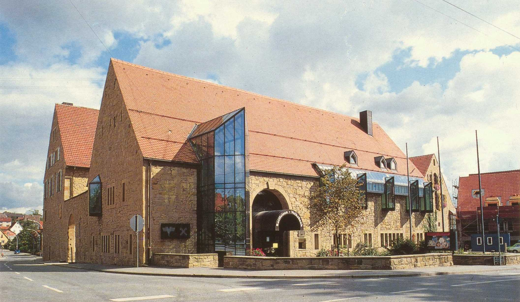 Güglingen, Zehntscheuer, Sitz der Volksbank, nach dem Umbau 1976.